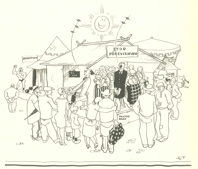 caricature by Hjalmar Pettersson published in Folkets Dagblad Politiken August 7, 1929 on the Gammalsvenskby returnees. The captions reads "Svenskyborna ska medverka vi[d] en hembygdsfest i Ljungby.", "-Om nu dom där försörjer sig som marknadsgycklare, så kanske vi svenska lantarbetare kan försöka få lite av dom utlovade sju miljonerna till jordbrukskolonier!"